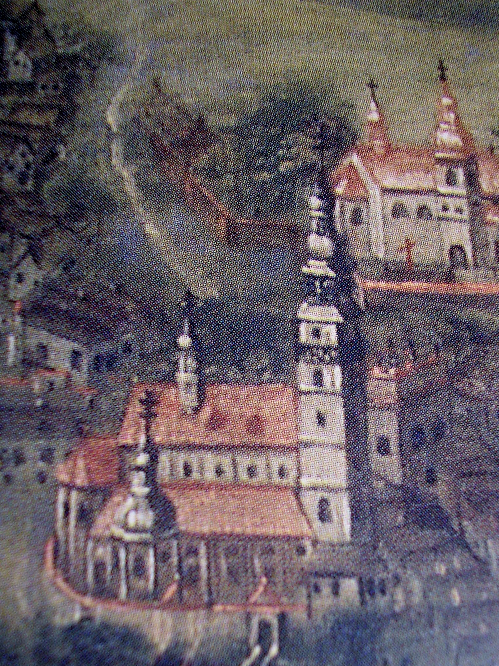 Městská věž v Třebíči v detailu na votivním Mariazellském obraze z roku 1766